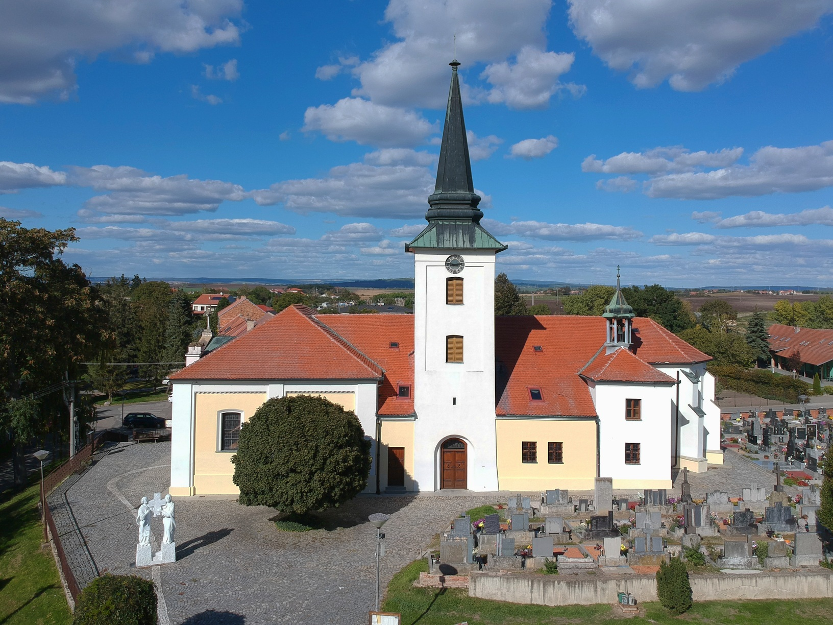 Sousoší sv. Cyrila a Metoděje před kostelem sv. Jiljí, Moutnice. Zhotovil sochař Petr Váňa roku 2013.